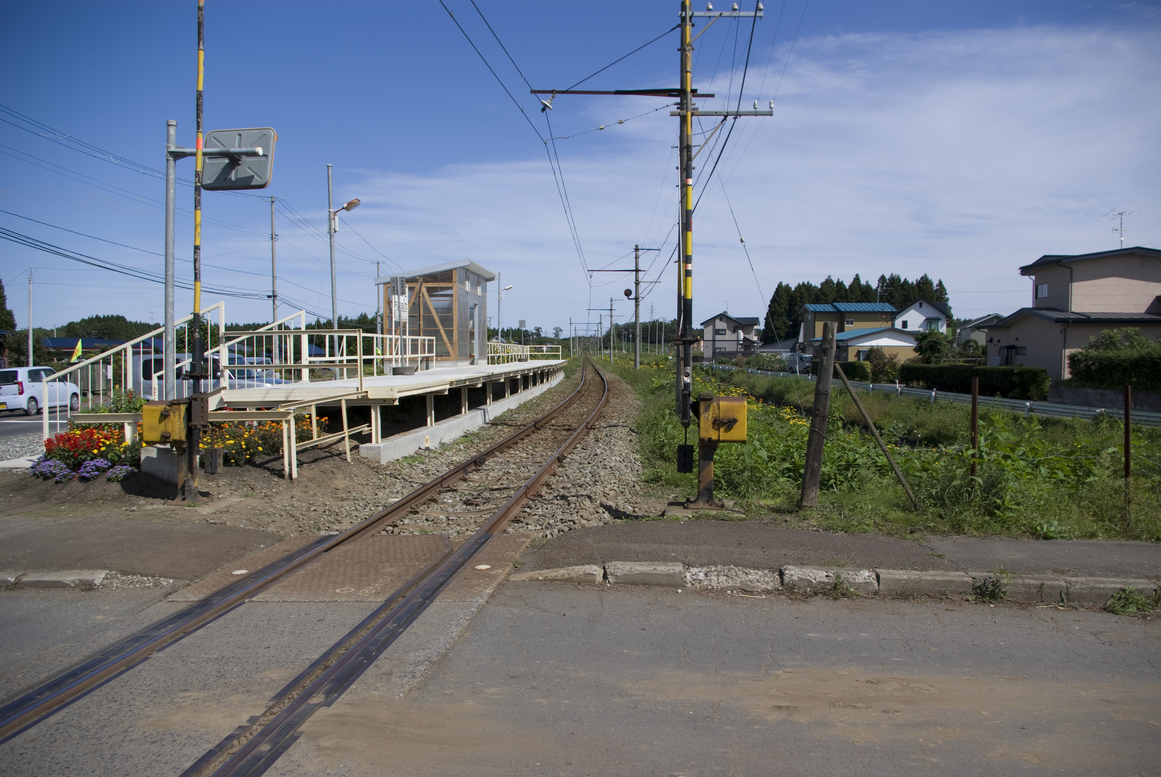 十和田観光電鉄古里駅